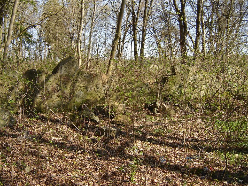 Ruiny pałacu w Czarnkowie.